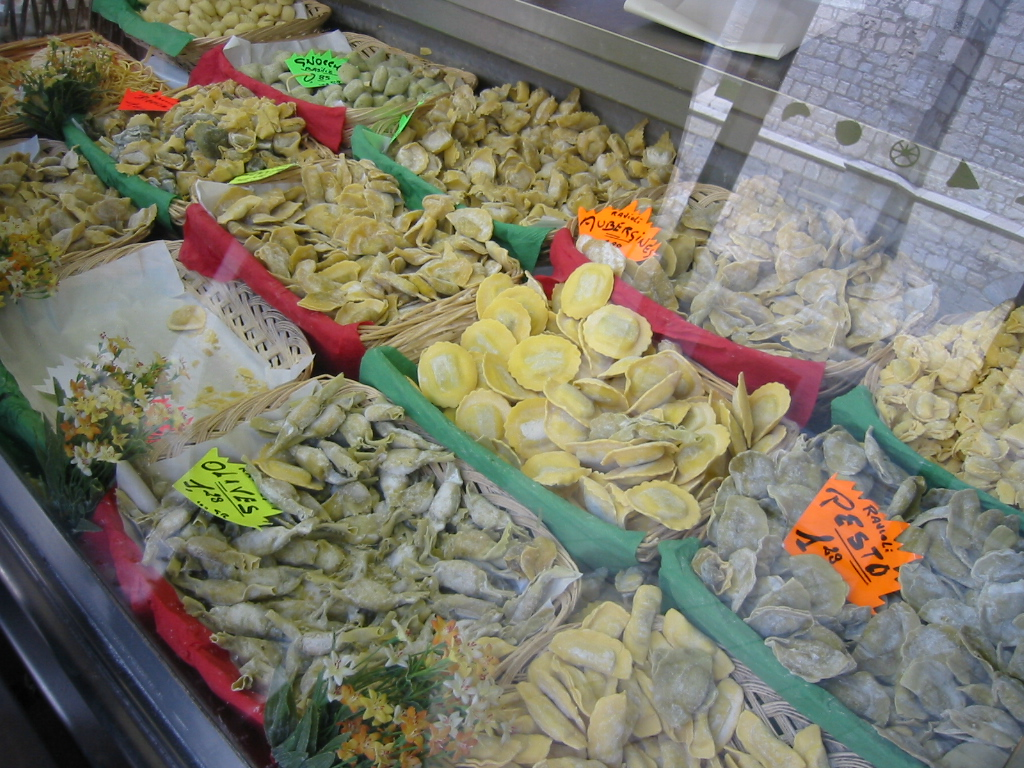 Ravioli